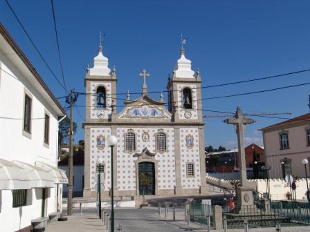 Igreja matriz e pelourinho da Freguesia de Cesar em Oliveira de Azeméis (Portugal)